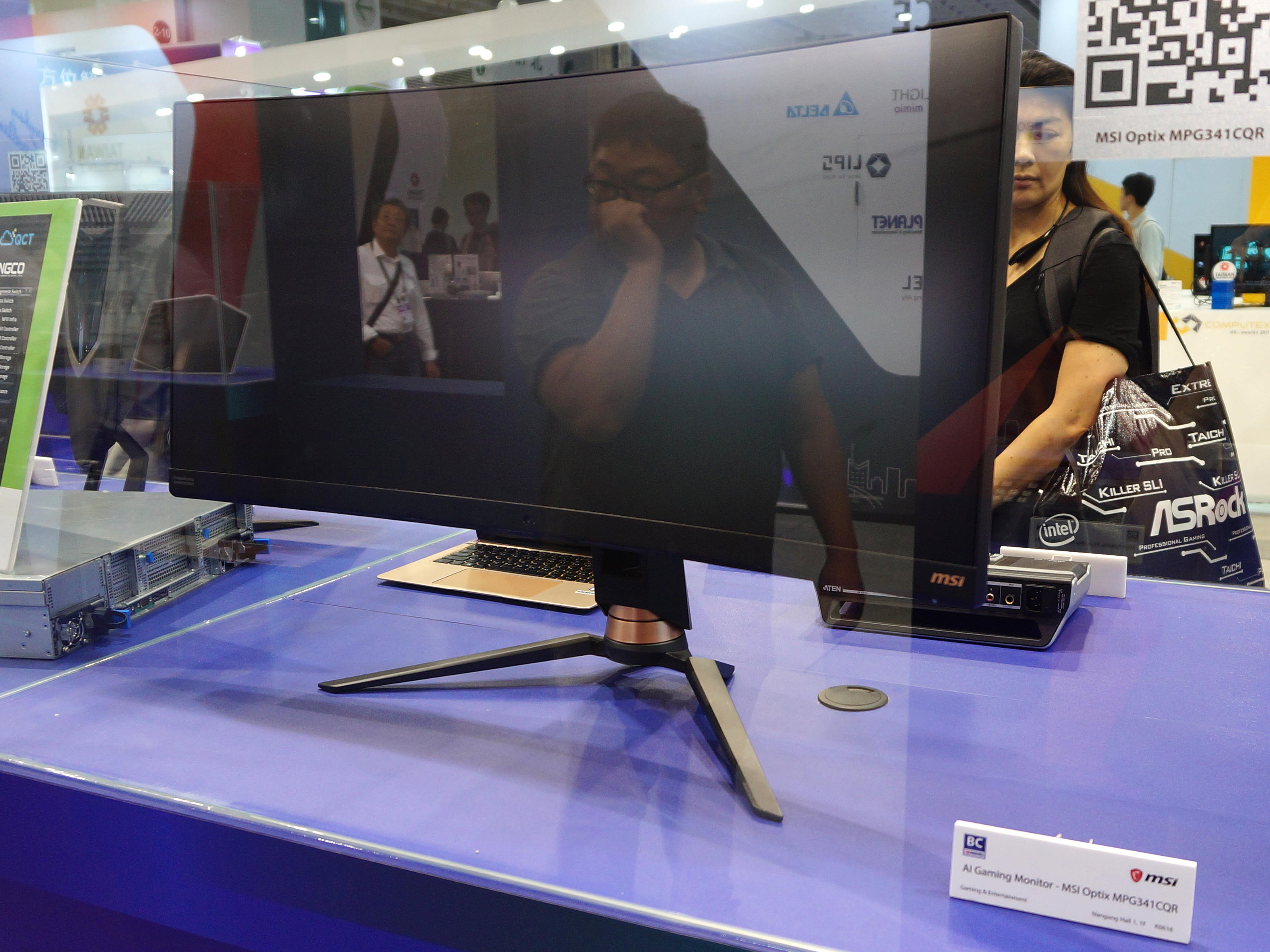 2019台北國際電腦展，微星科技人工智慧曲面電競顯示器Optix MPG341CQR。